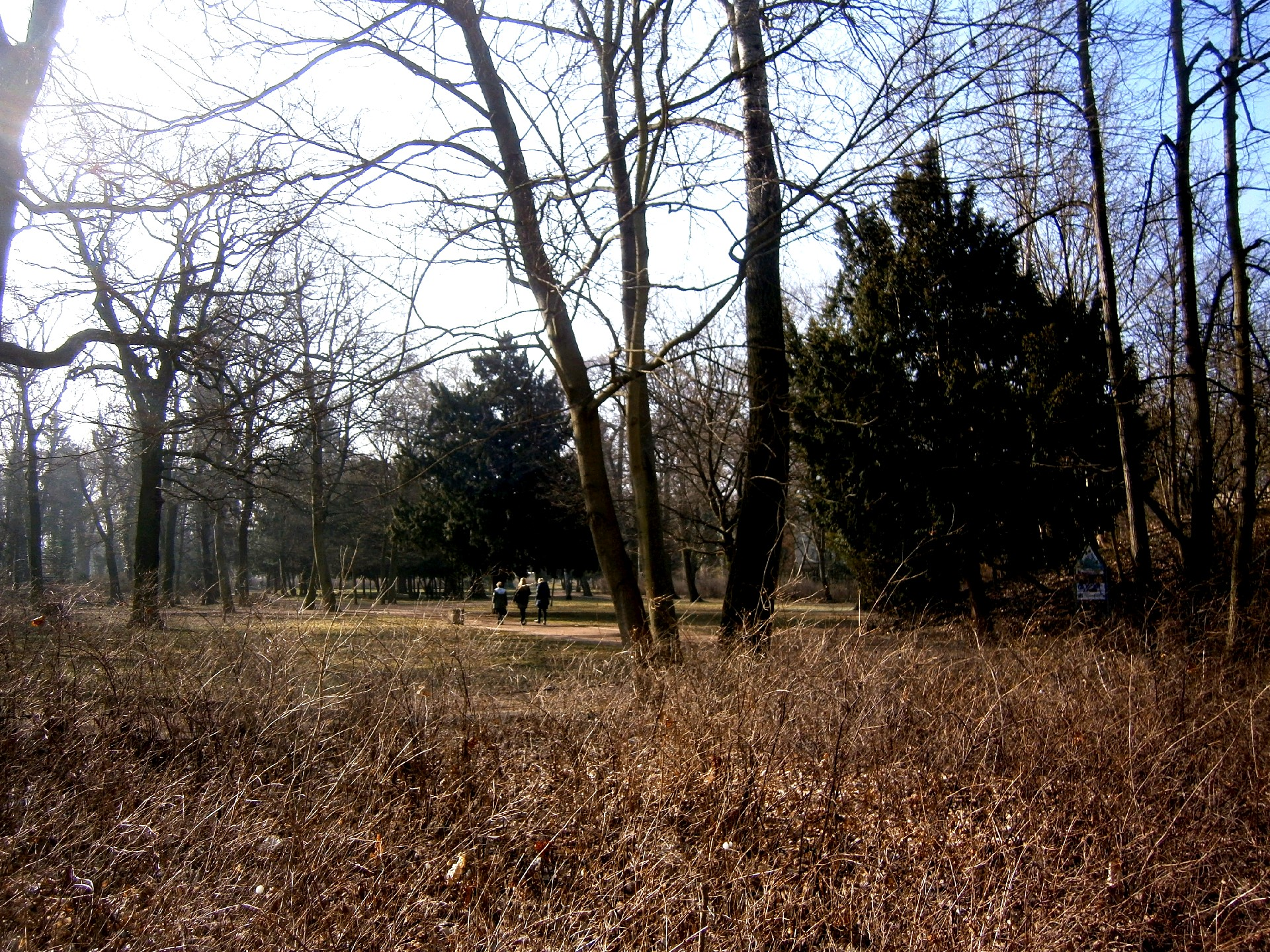 Beuthstraße ist eine Straße in Berlin-Niederschönhausen. Südlich der Straße liegt der Brosepark.